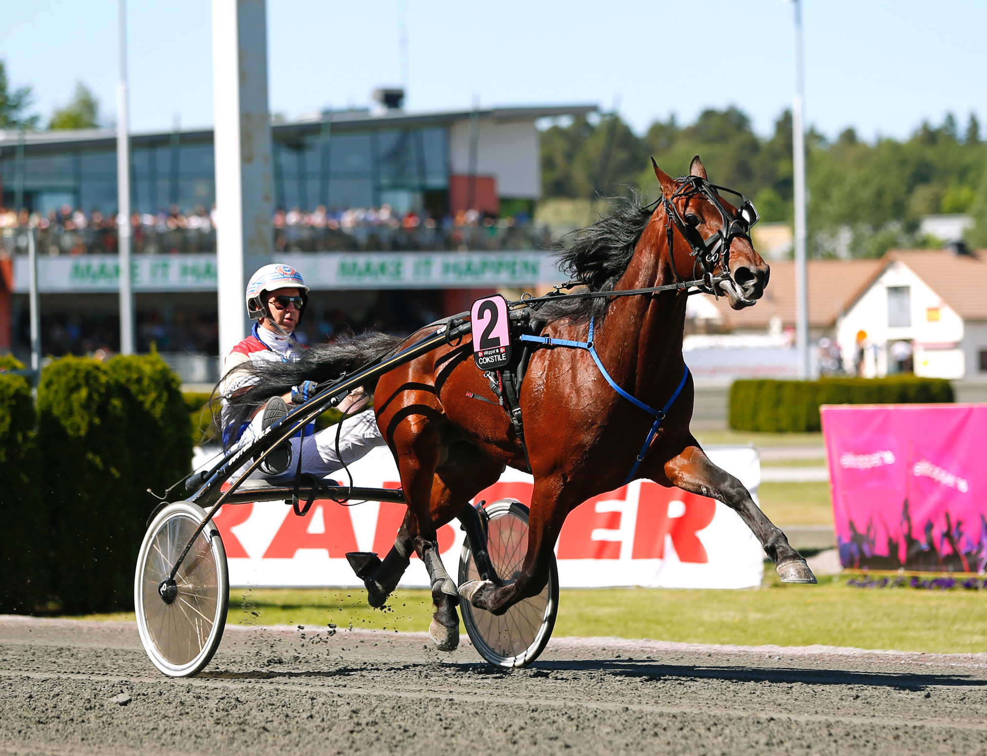 Cokstile & Lars Anvar Kolle inför Elitloppet 2018 på Solvalla.